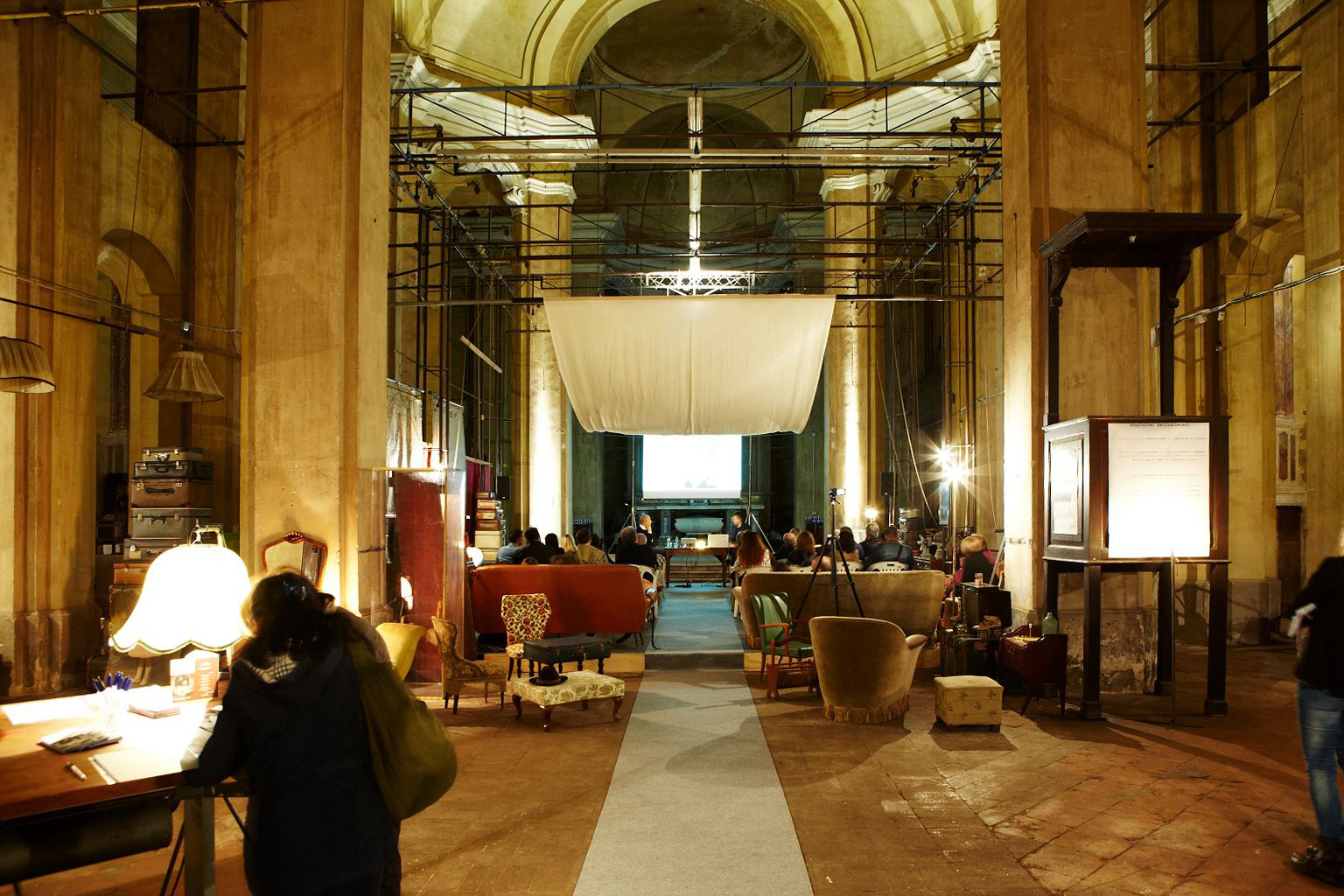 Interno della Chiesa di San Bartolomeo con l'allestimento di Santafabbrica - © Augusta Grecchi e Davide Giacobbi - ( primavera 2015 )